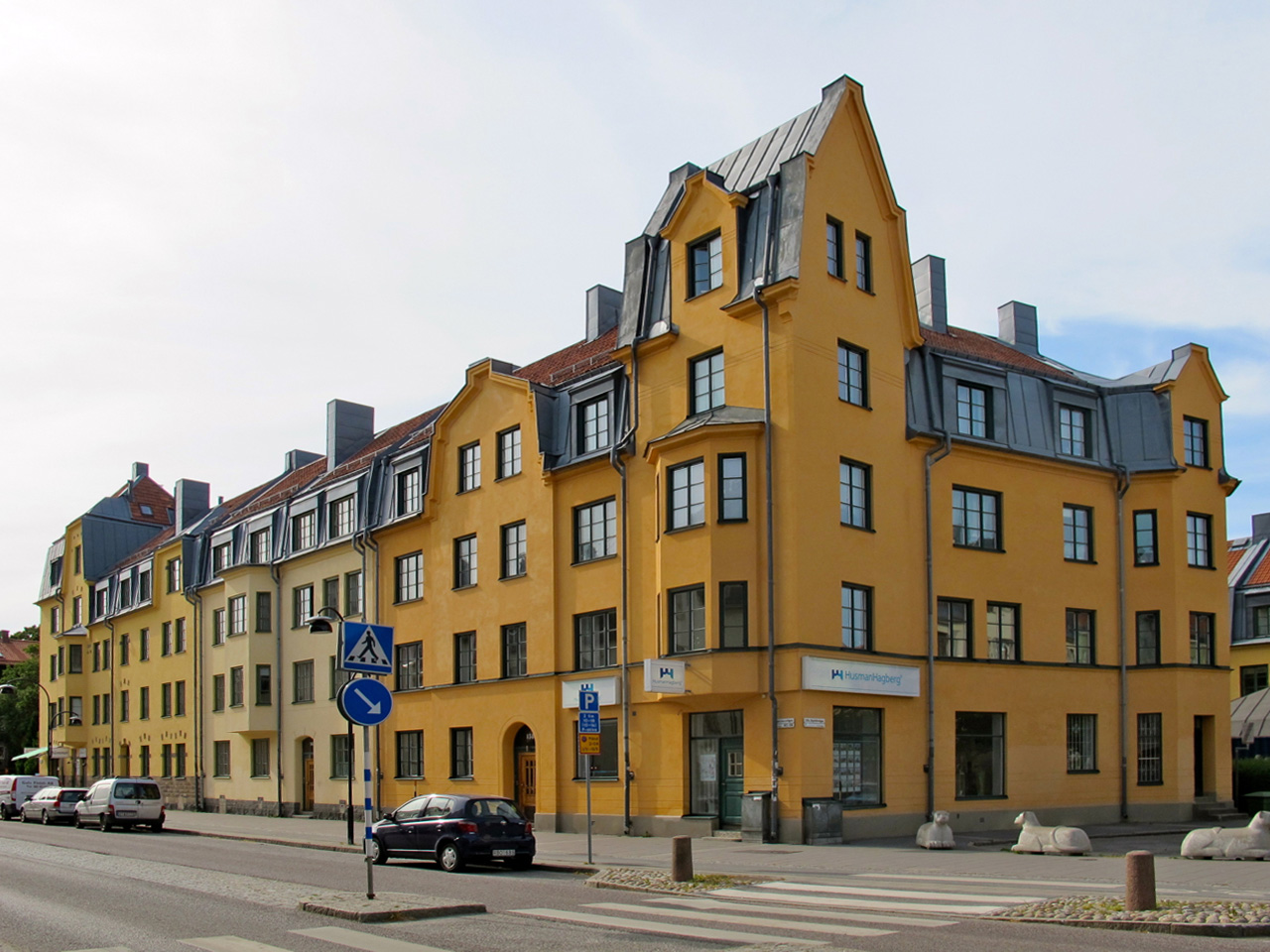 Hägerstensvägen i Aspudden i södra Stockholm, 2014